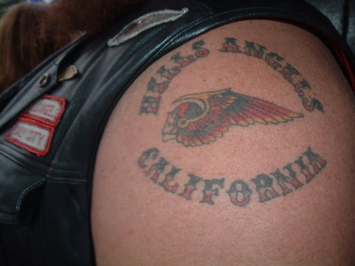 Das Deathshead-Emblem der Hells Angels als Tätowierung, hier bei einem mutmaßlichen Hells Angels-Mitglied aus Kalifornien, USA.